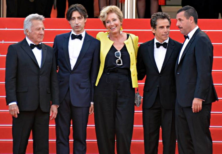 Dustin Hoffman, Noah Baumbach, Emma Thompson, Ben Stiller et Adam Sandler lors de la présentation du film "The Meyerowitz Stories" au festival de Cannes